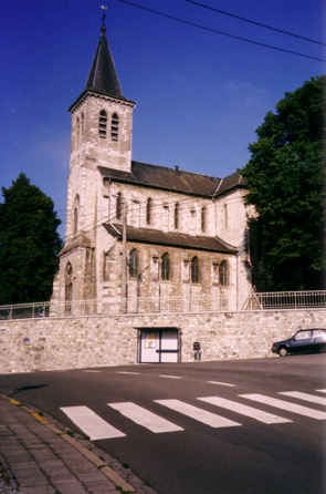 Eglise Sainte Marguerite à Bouge